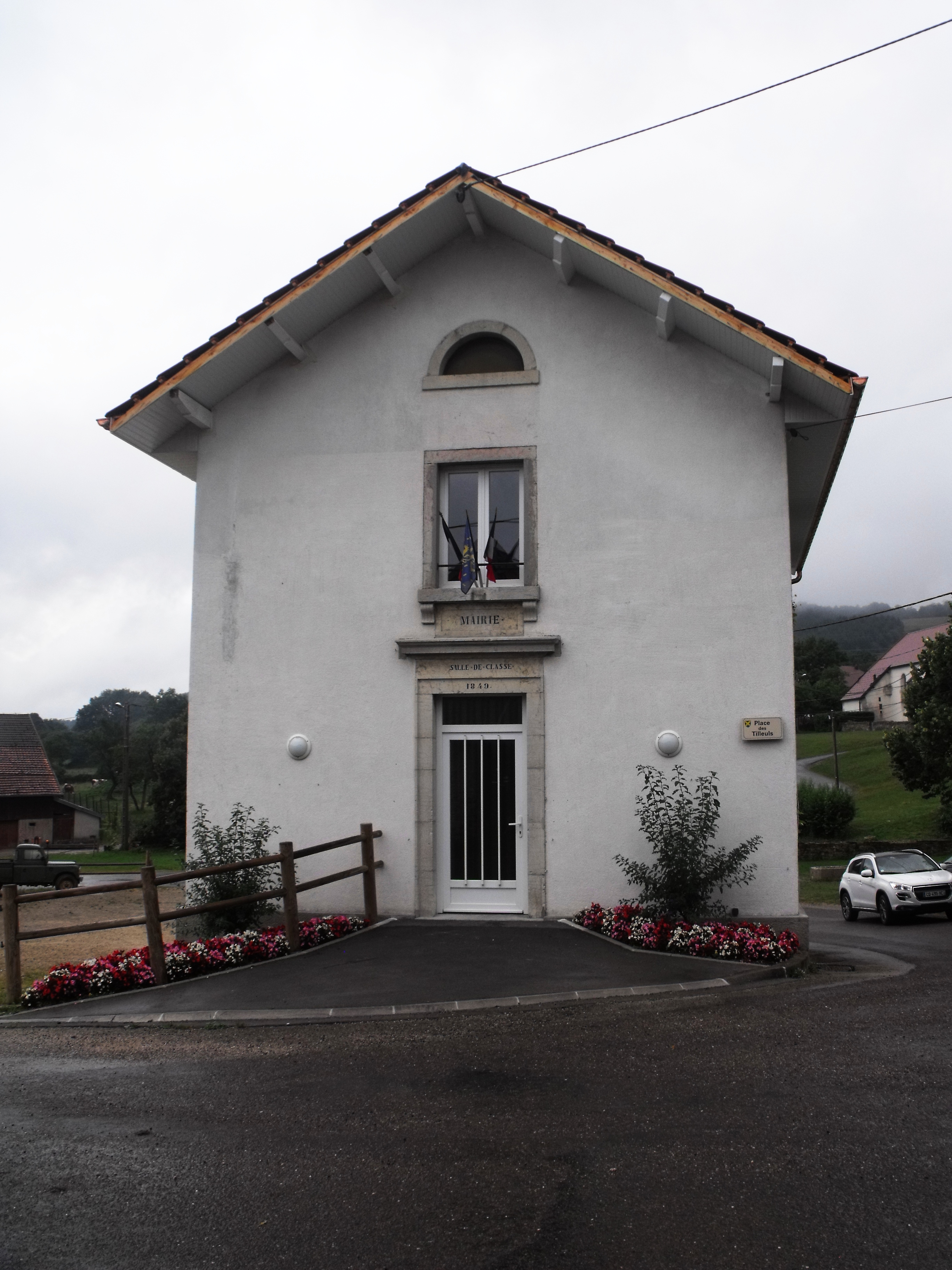 Mairie de Peseux, Doubs, France